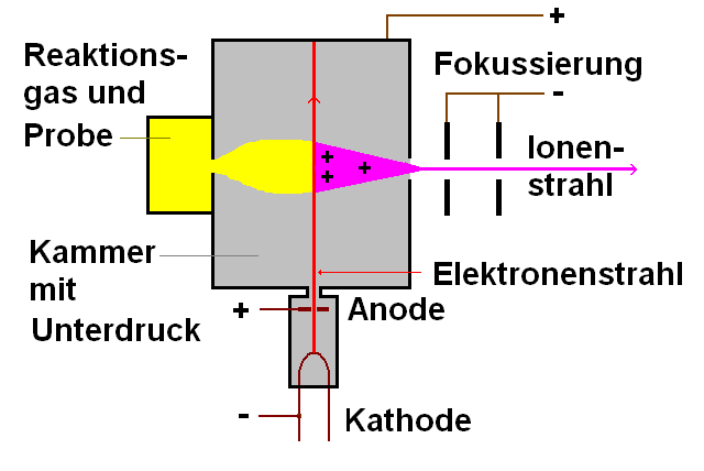 Schema der chemischen Ionisation für die Massenspektrometrie